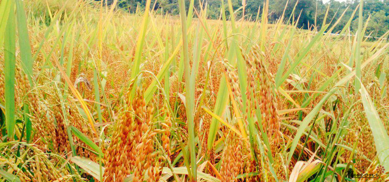 Padi Sawah Nyalindung Pasirhuni Cikadu Menguning